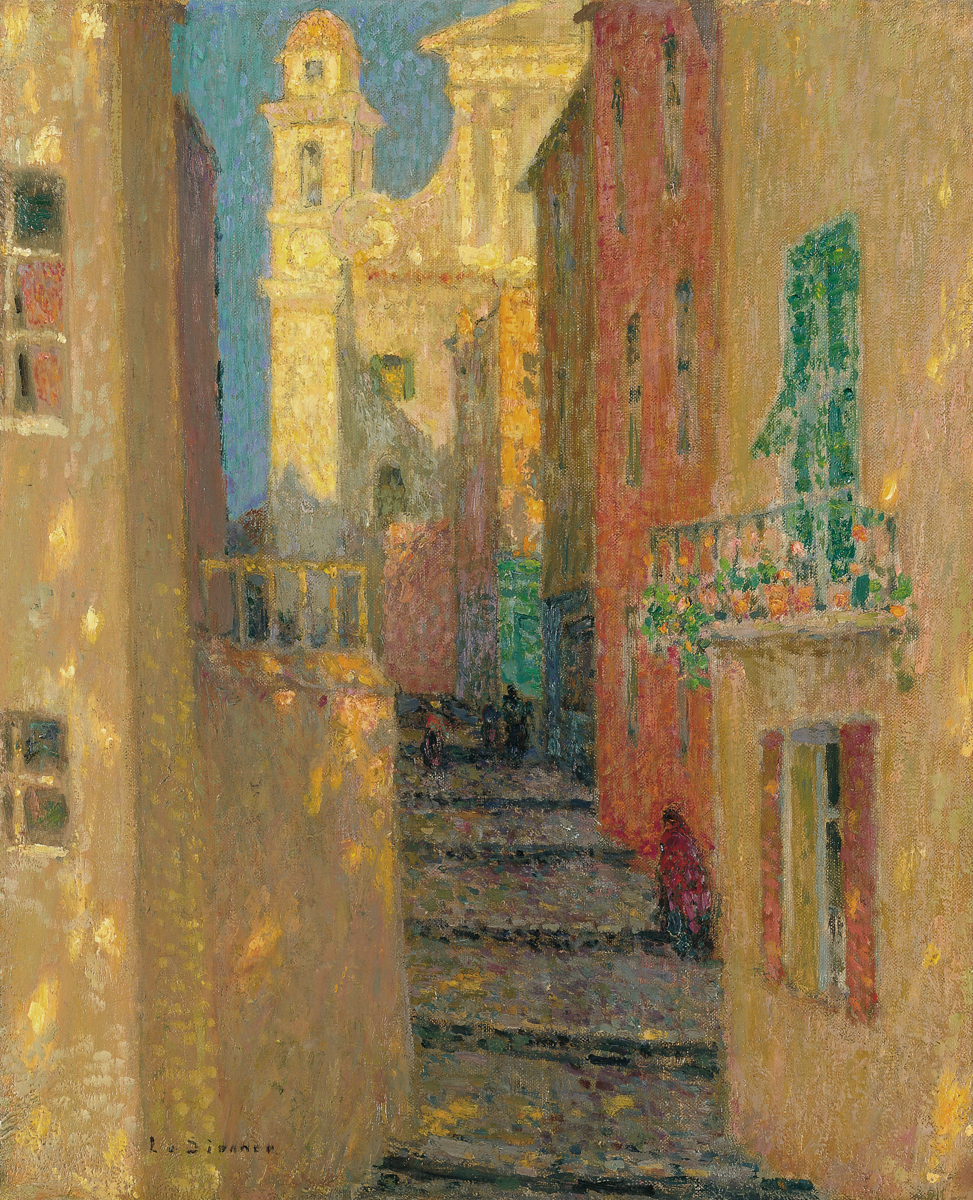 La rue de l'Eglise, Villefranche-sur-Mer par Henri-Eugène Le Sidaner. Oil on canvas. 71 x 60 cm. Collection Carmen Thyssen-Bornemisza, en dépôt au Musée Thyssen-Bornemisza, Madrid.